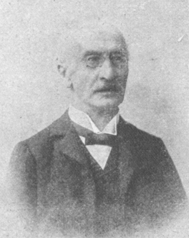 Jakob Grün (1837–1916), österreichischer Violinist und Geigenlehrer, Mitglied der Wiener Philharmoniker.